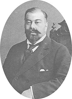 Портрет А.А Орлова-Давыдова